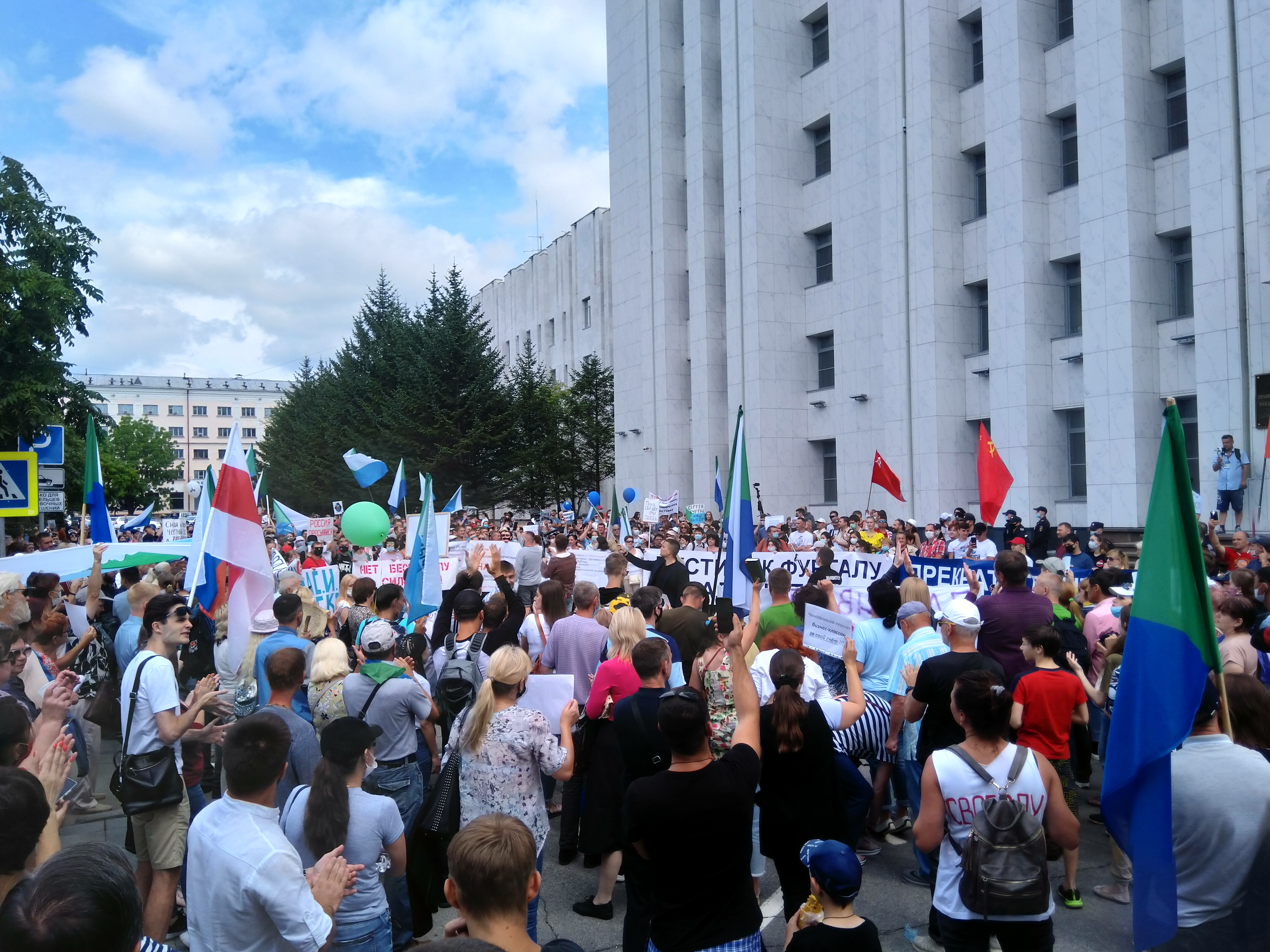 Митинг в Хабаровске 8 августа 2020. Площадь Ленина